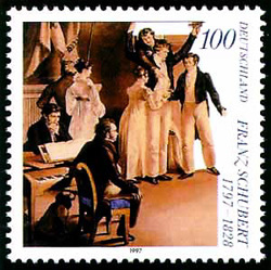 Ausschnitt "Schubertianer in Afzenbrugg" von L. Kupelwieser